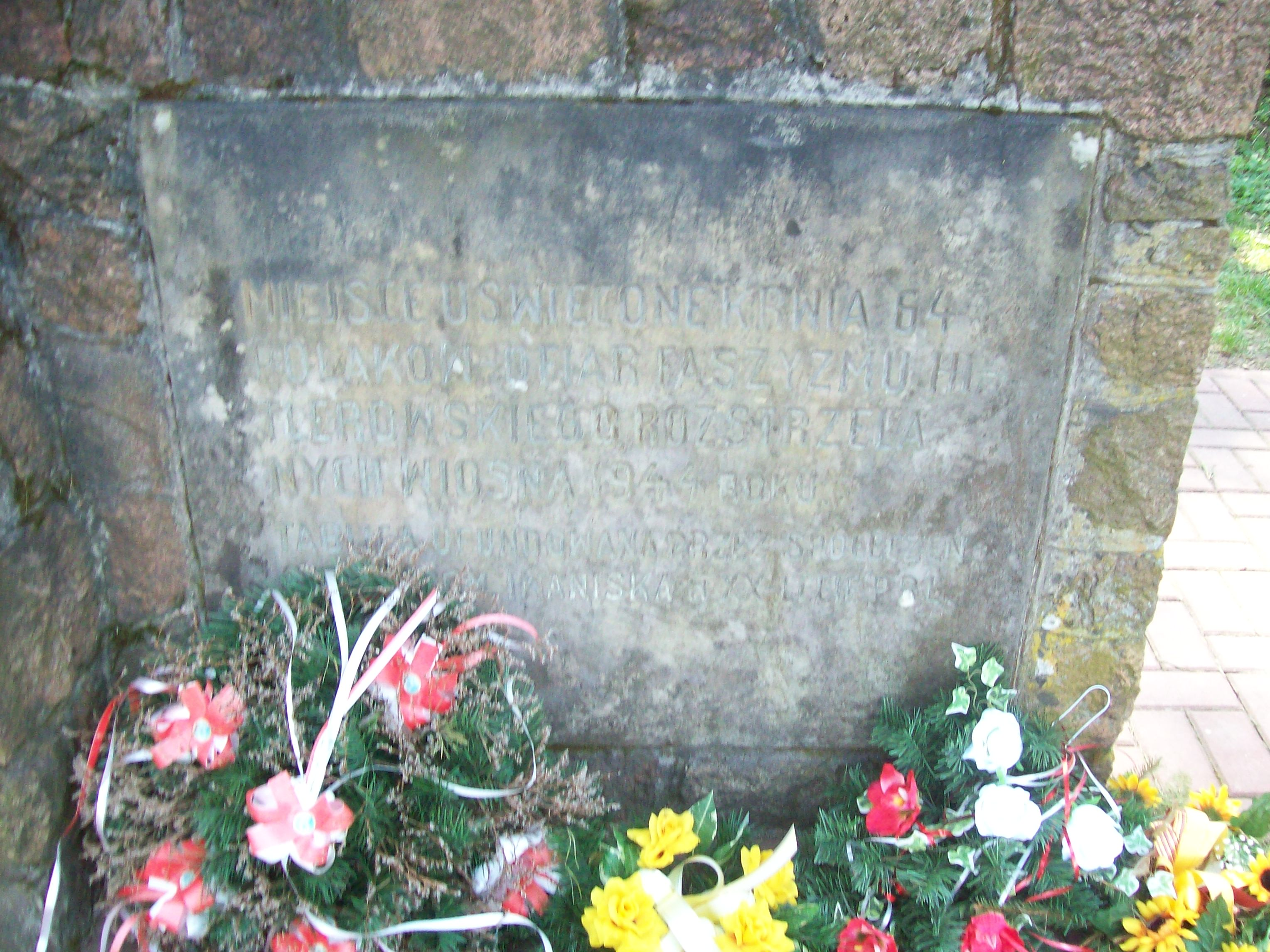 Tablica na monumencie w miejscu pamięci w Haliszce.